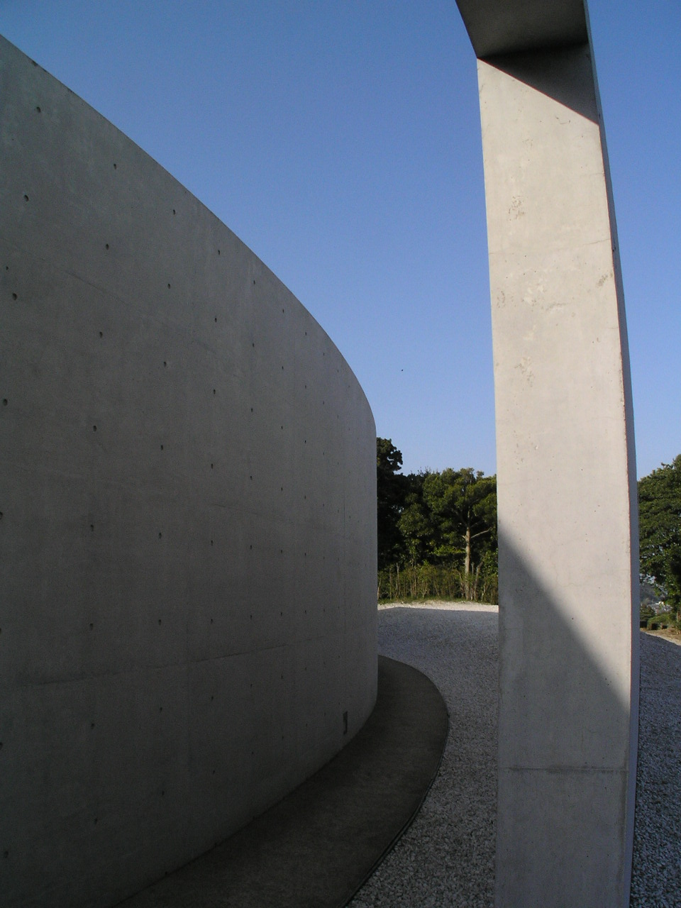 本福寺水御堂（ほんぷくじみずみどう） 本福寺は、平安時代後期に創建された真言密教の寺院で真言宗別格本山。水御堂はその本堂で1991年竣工の安藤忠雄設計による鉄筋コンクリート造の寺院建築。第34回建築業協会賞を受賞。 ～photo by Autumn Snake 【おぉたむ すねィく探検隊】写真部門 担当 大原佳苗